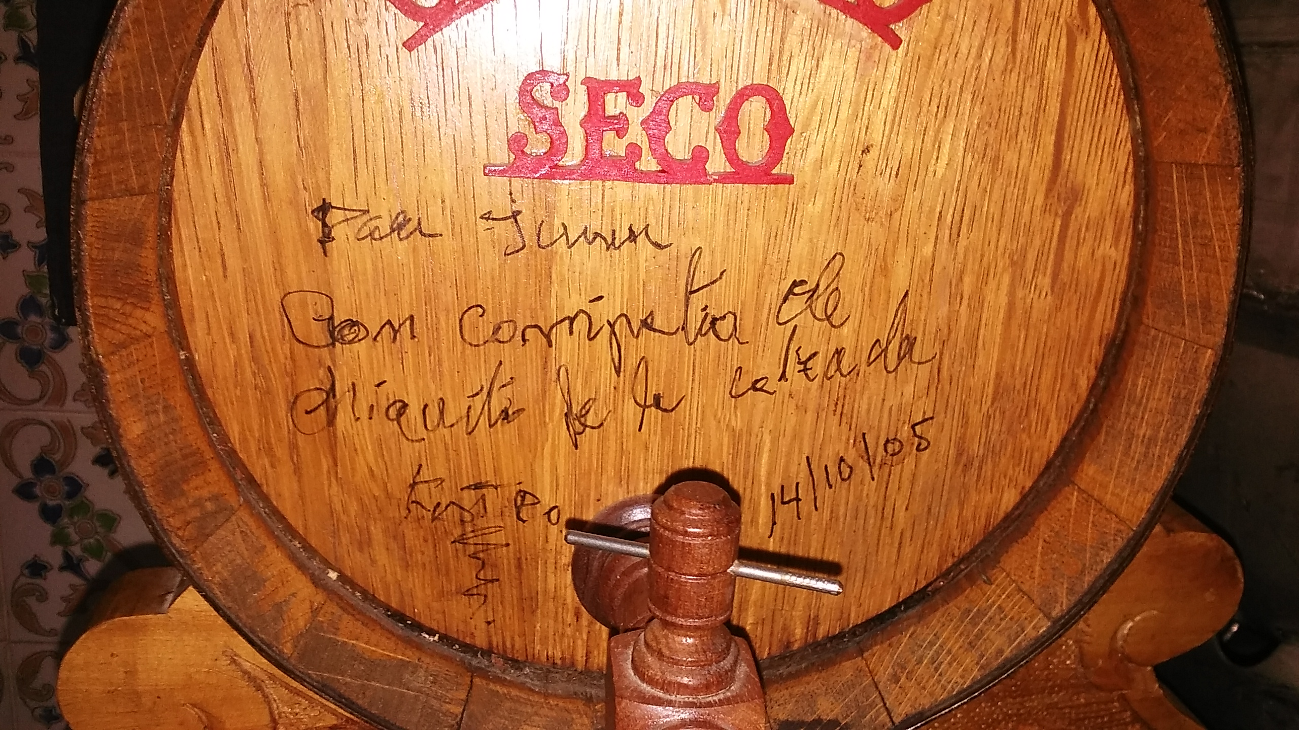 Dedicatoria Chiquito de la Calzada en el Bar "Mundo Nuevo" de Jerez de la Frontera (Andalucía, España)